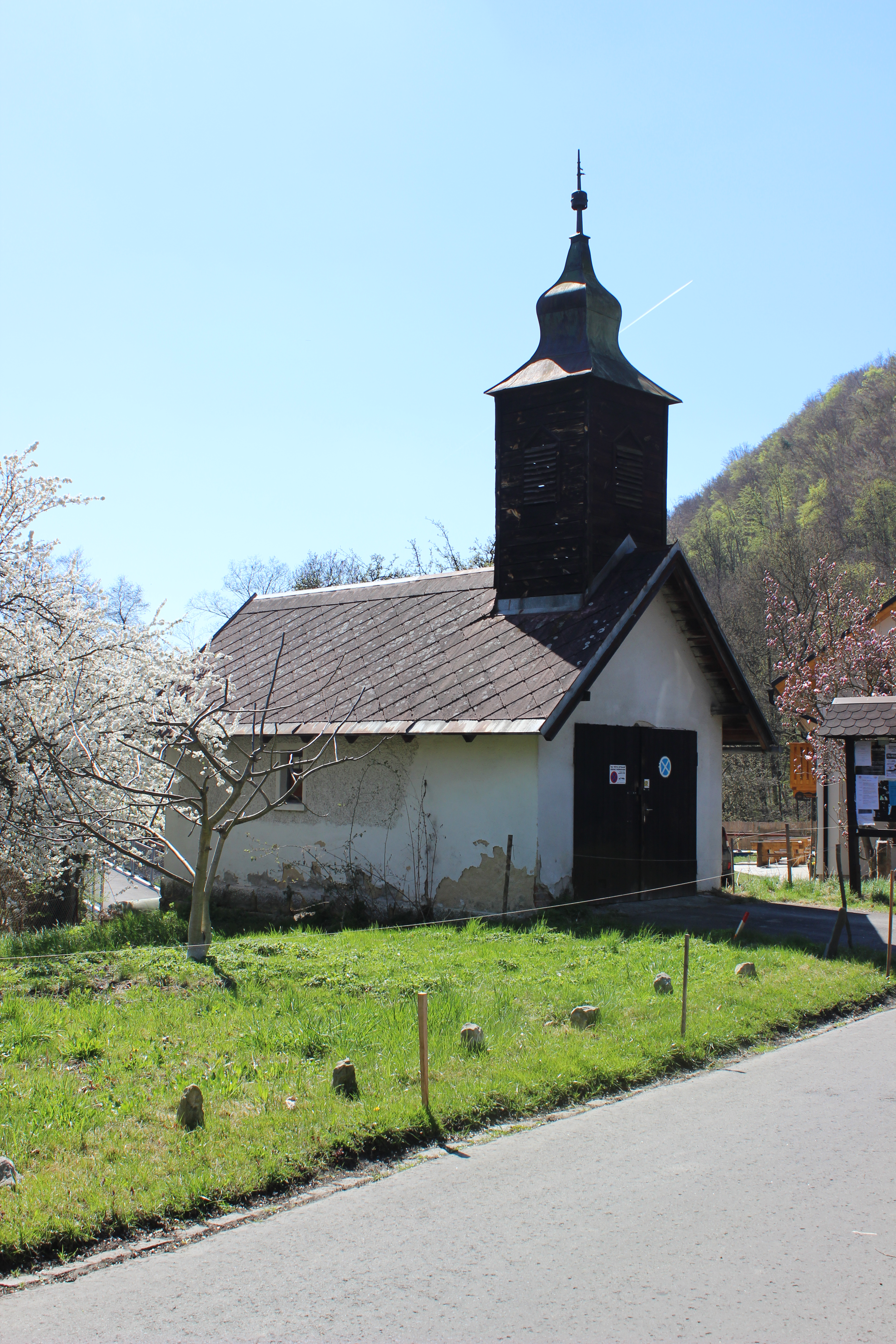 Zvonička v Křížkách (pohled od východu).